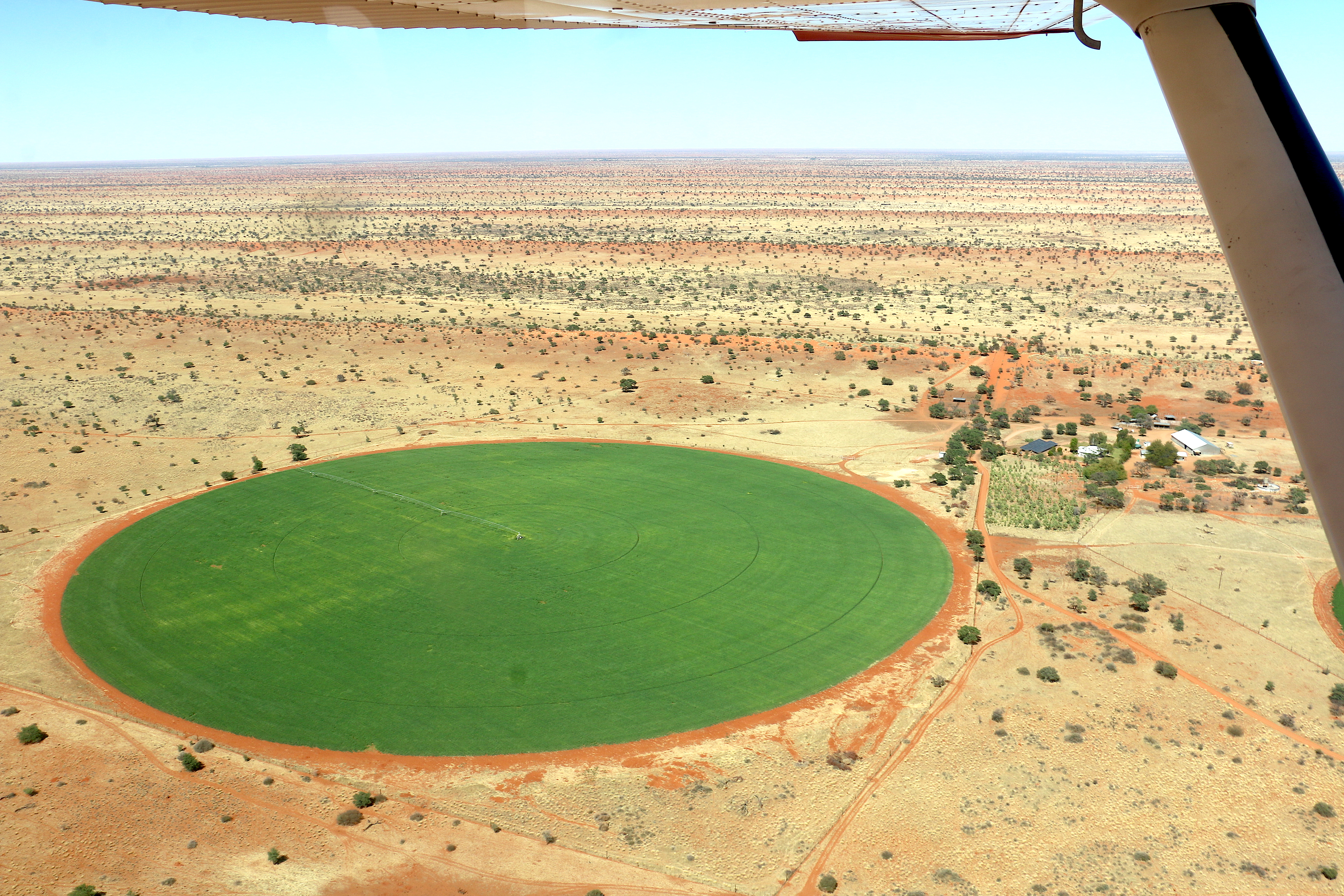 Kreisförmige Luzernefelder in der Kalahari